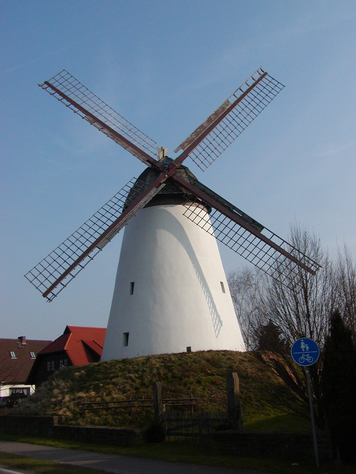 Die Windmühle (auch Hummelbecker Windmühle) in Dützen bei Minden in Nordrhein-Westfalen. Die Mühle ist zwischen 1808 und 1813 errichtet wurde. Seit der Restaurierung besitzt der Wallholländer mit seiner hohen Durchfahrt wieder eine Haube, eine Windrosenanlage und windgängige Segelflügel. Die Mühle ist Teil der Westfälischen Mühlenstraße.